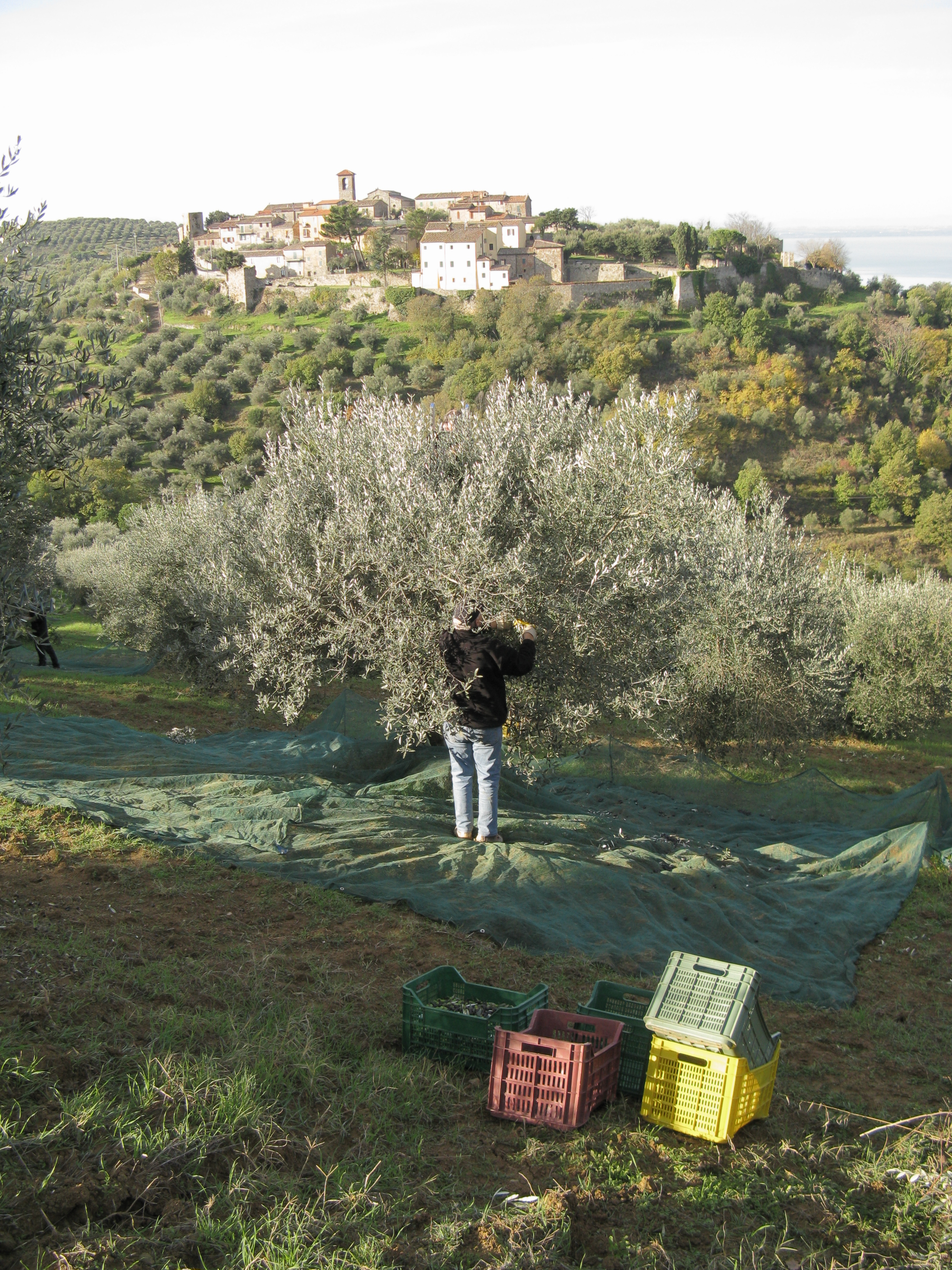 Olive picking in Montecolognola, Umbria